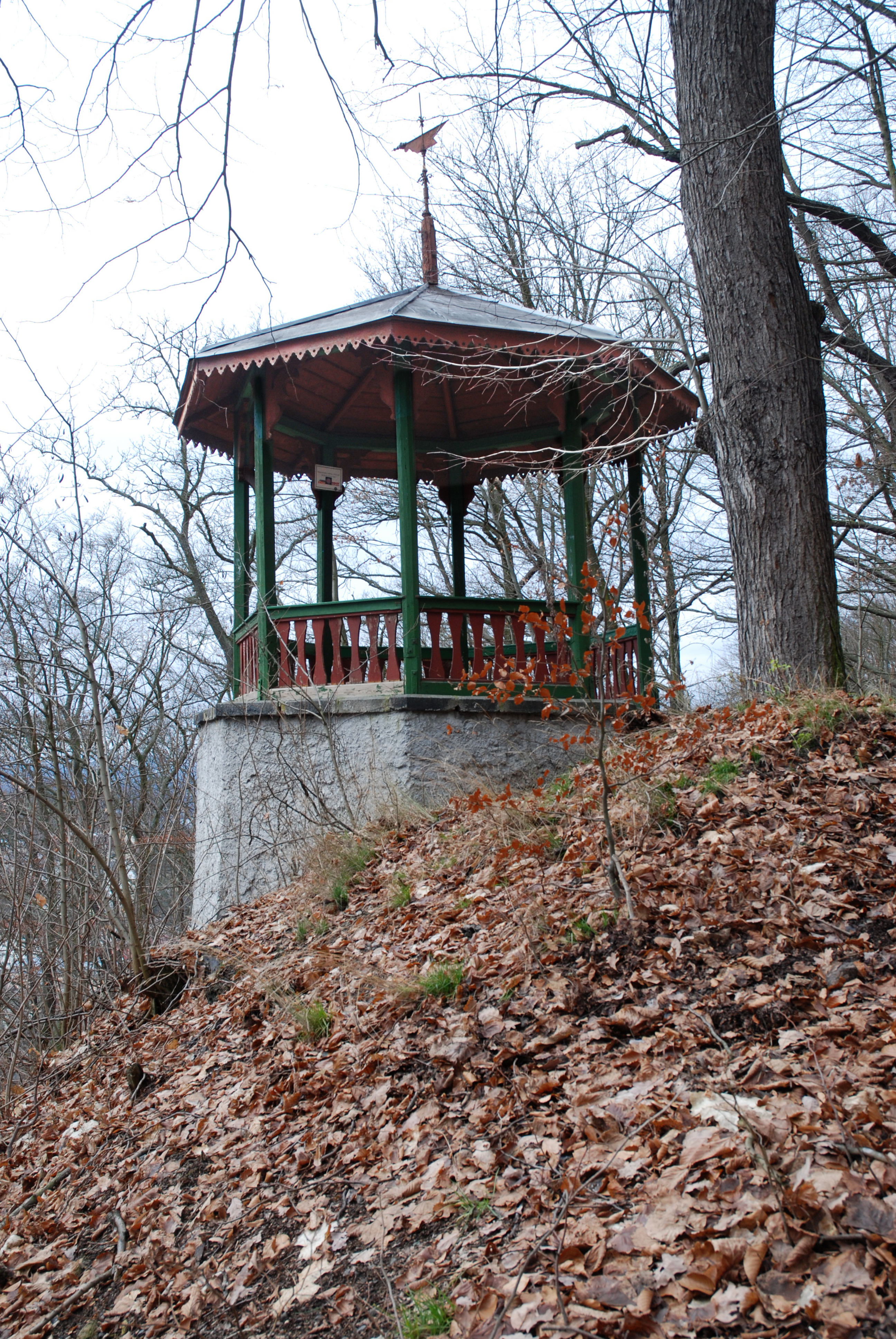 Altán Panorama v lázeňských lesích v Karlových Varech